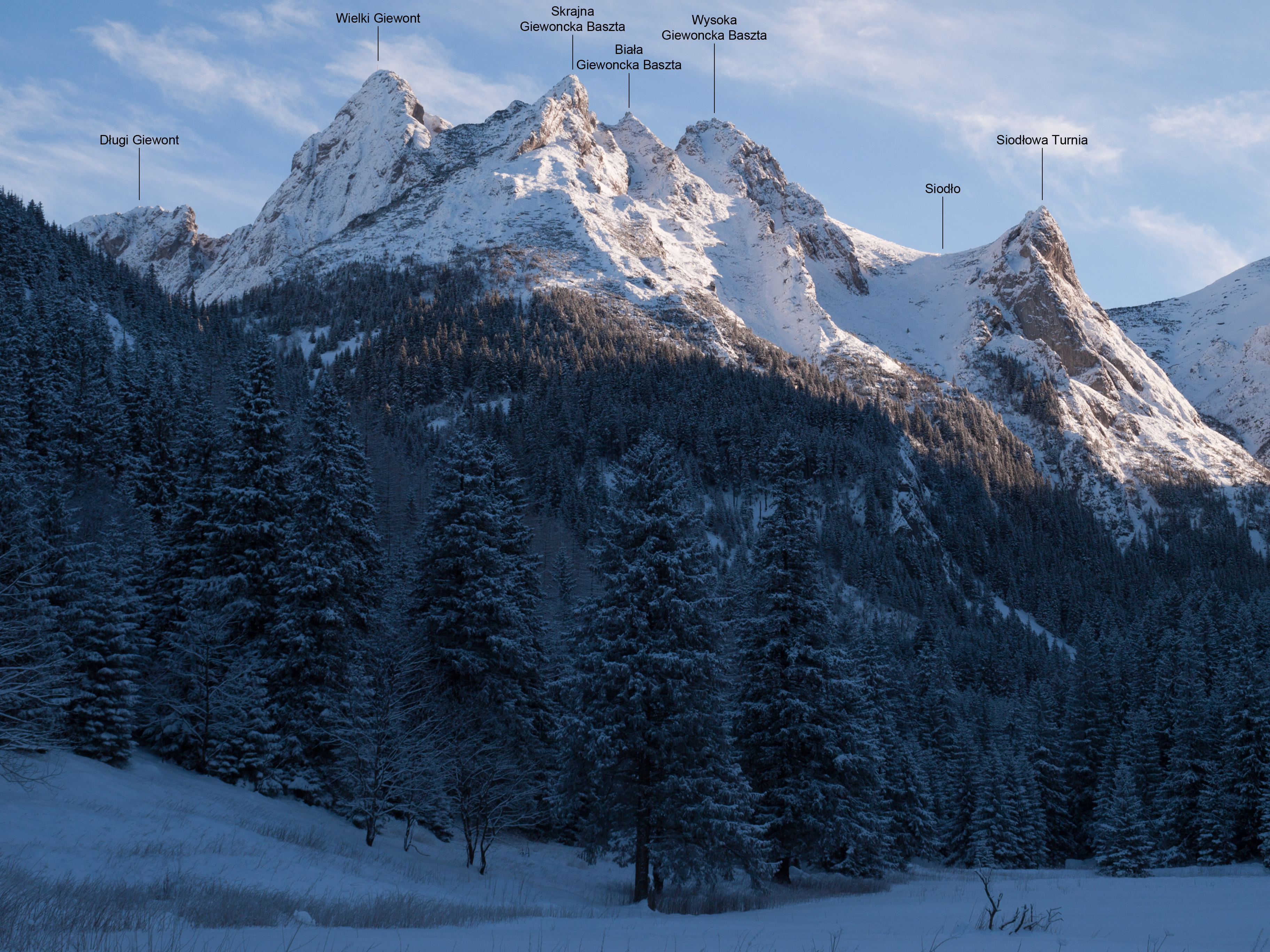 Długi Giewont, Wielki Giewont, turnie Małego Giewontu i Siodłowa Turnia – widok z Wielkiej Polany w Dolinie Małej Łąki.